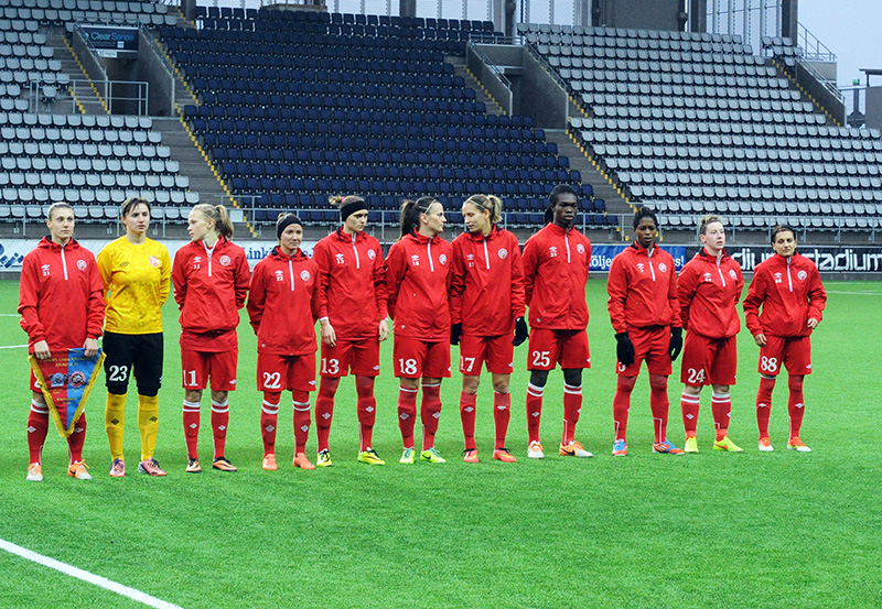 a_9_0182